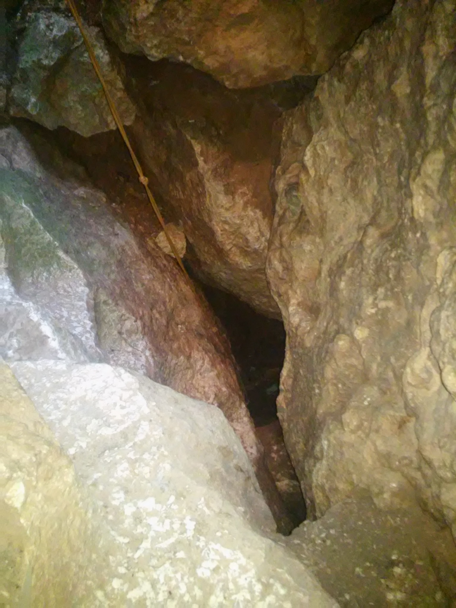 Buzluk Mağarası Harput, Elazığ